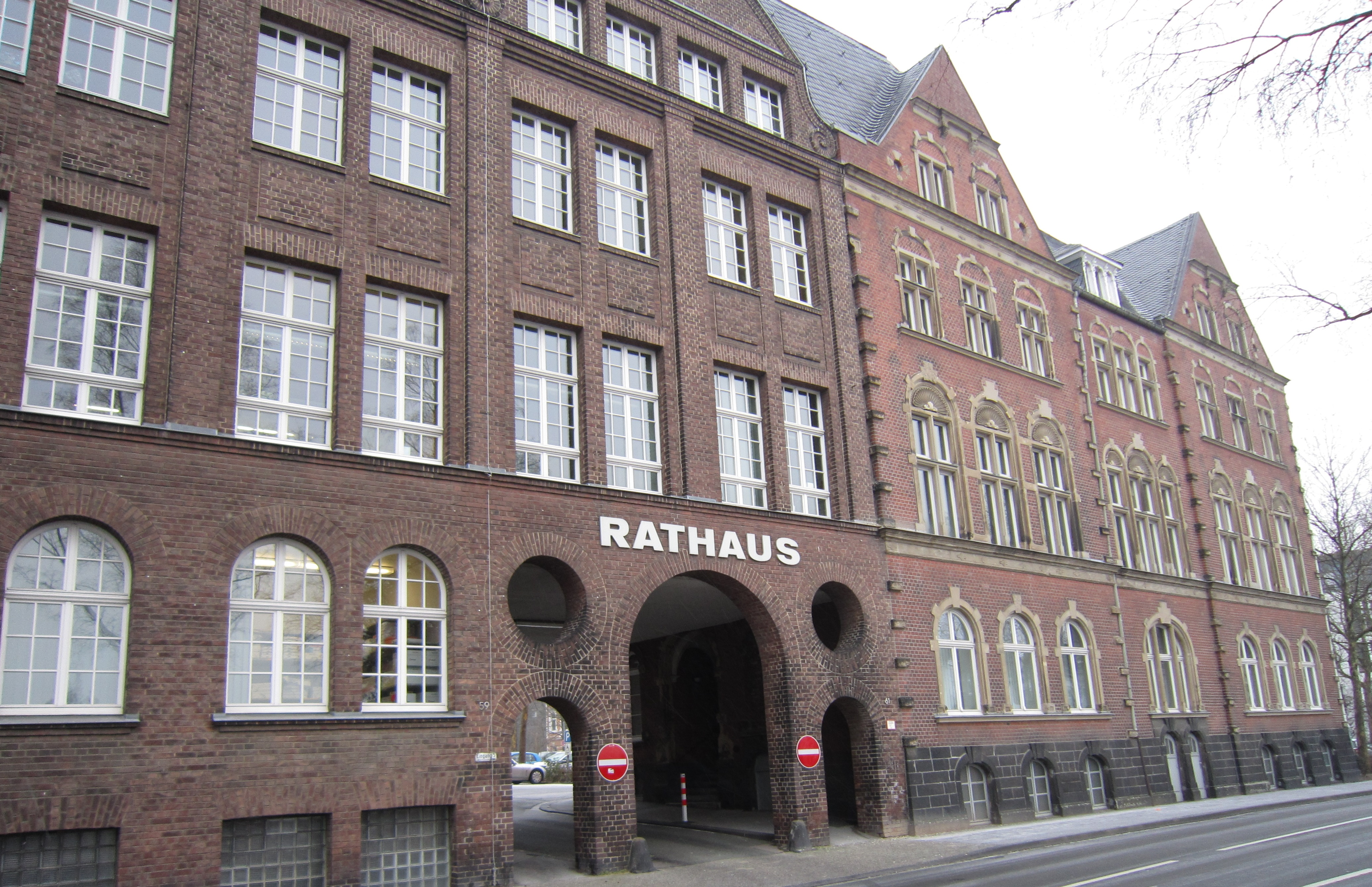 Rathaus Altbauten an der Cronenberger Straße, Solingen-Mitte, aufgenommen im Februar 2012